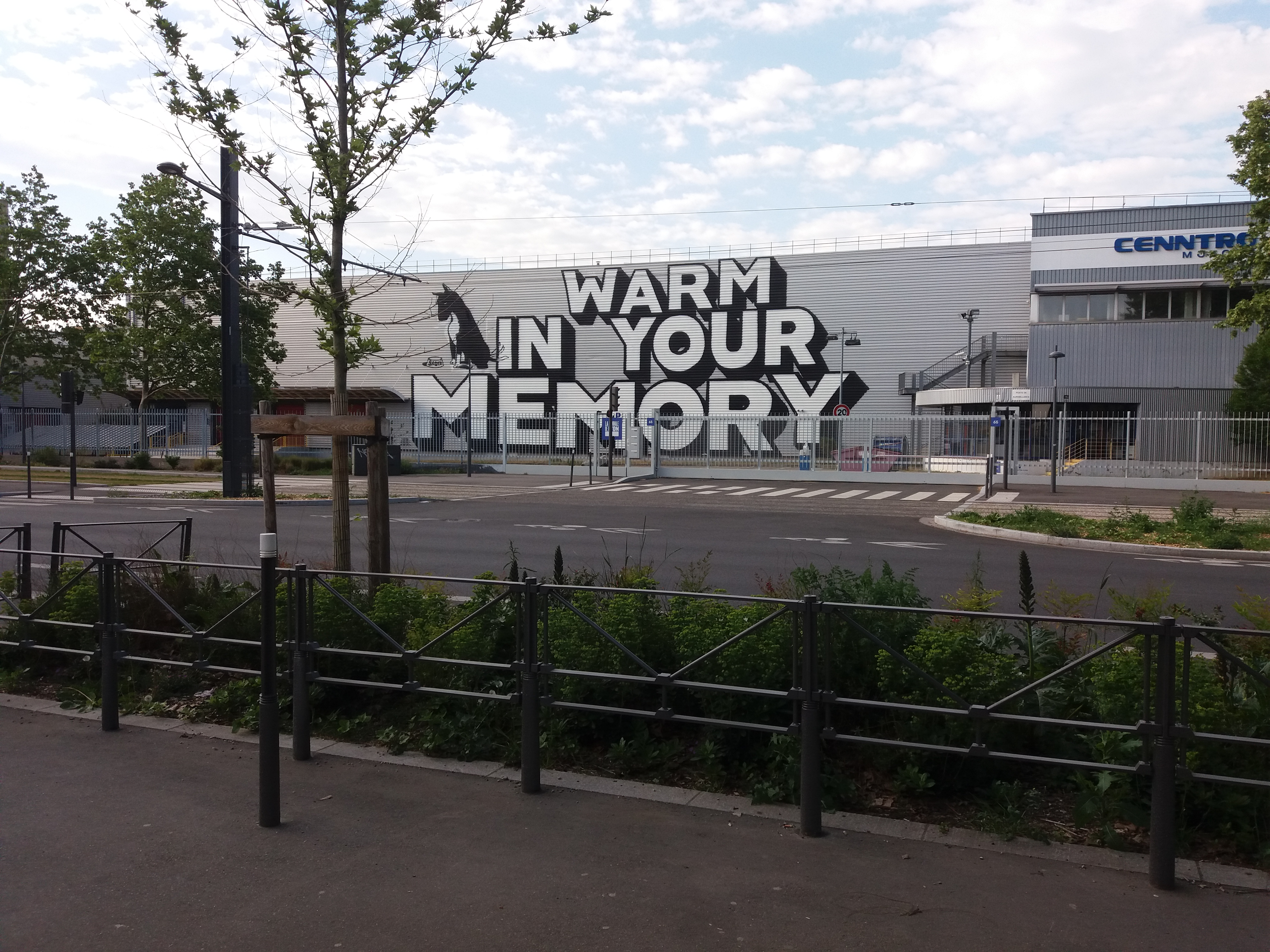 Entrée.